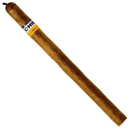 Cohiba Lanceros